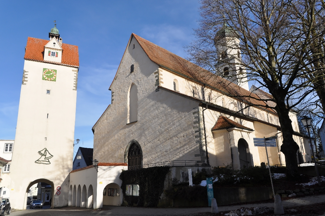 Ein Spaziergang durch Isny im Allgäu im Dez 2012